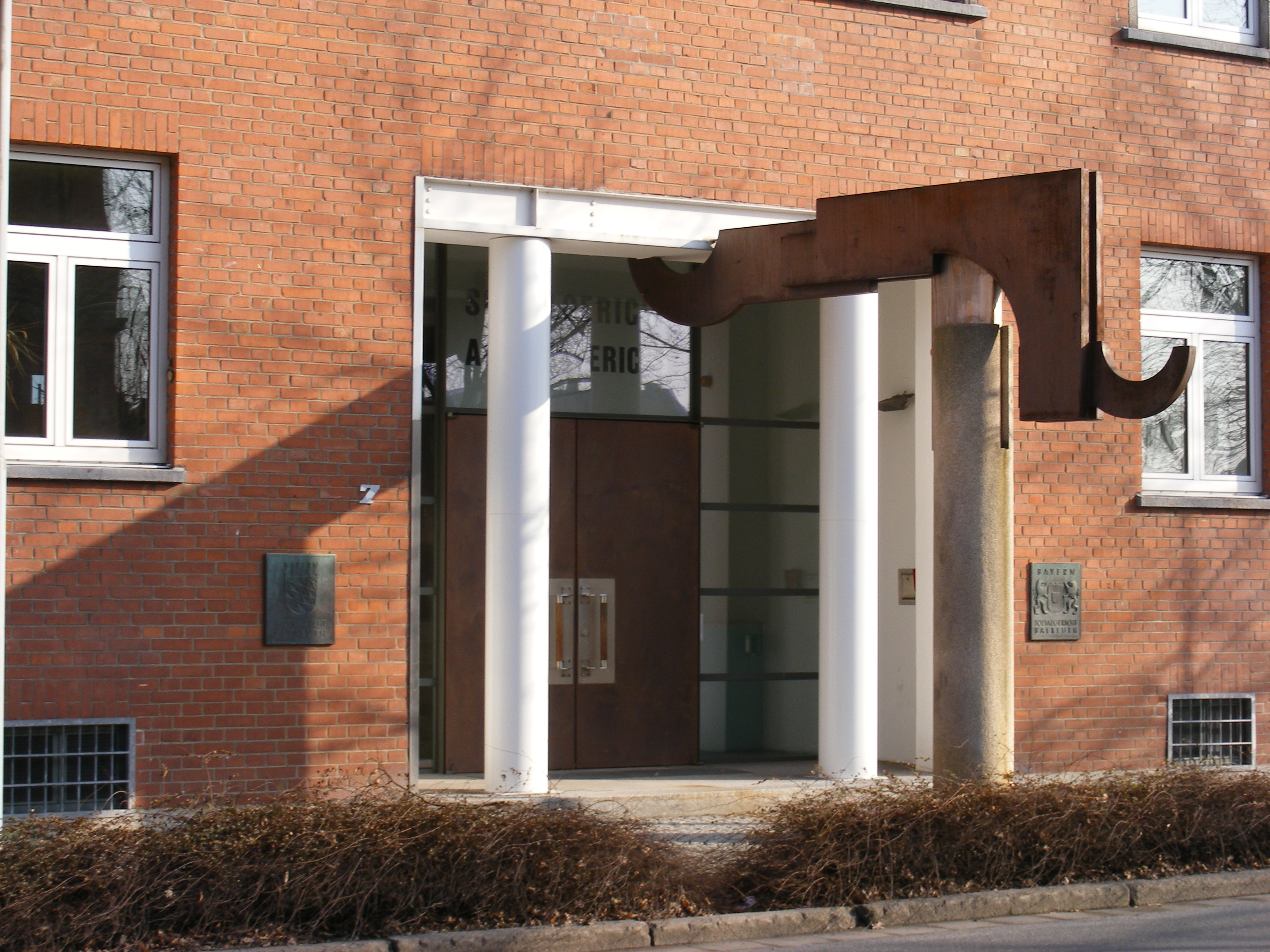 Bayreuth - Ludwig-Thoma-Straße 7, Eingang zu den Gerichten Arbeitsgericht Bayreuth und Sozialgericht Bayreuth